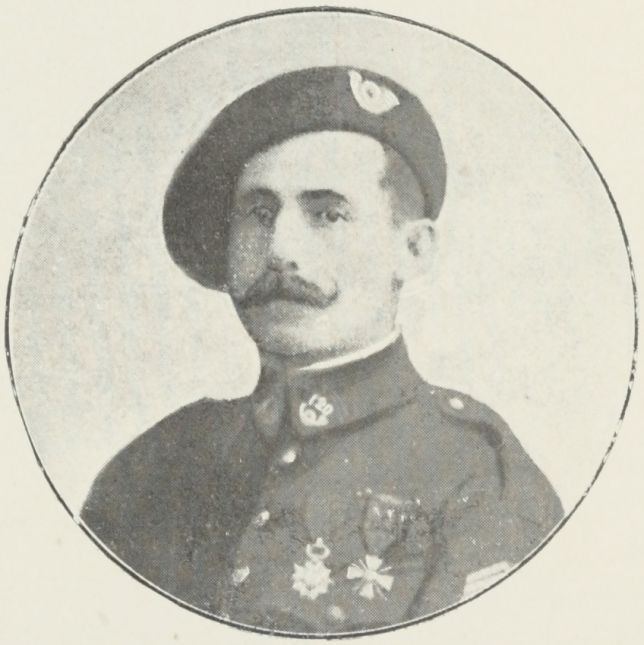 Le capitaine Bel, adjudant-major du 120e BCP (31 mars 1918-9 mai 1919).